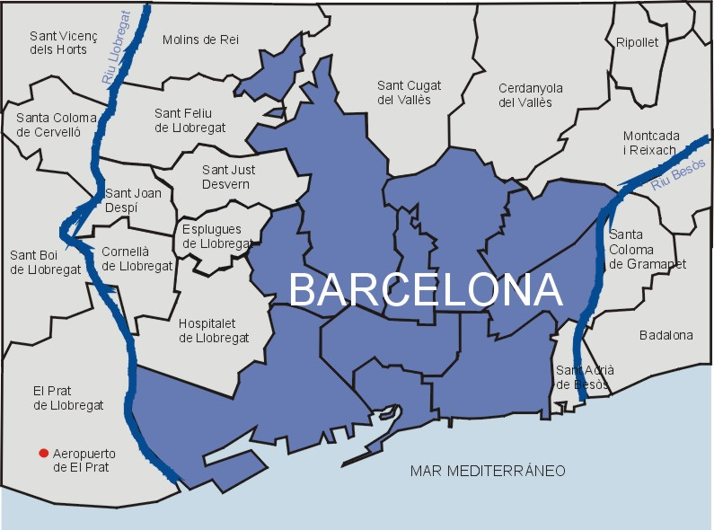 Mapa de Barcelona y su área metropolitana Mapa dibujado por Sergi Larripa